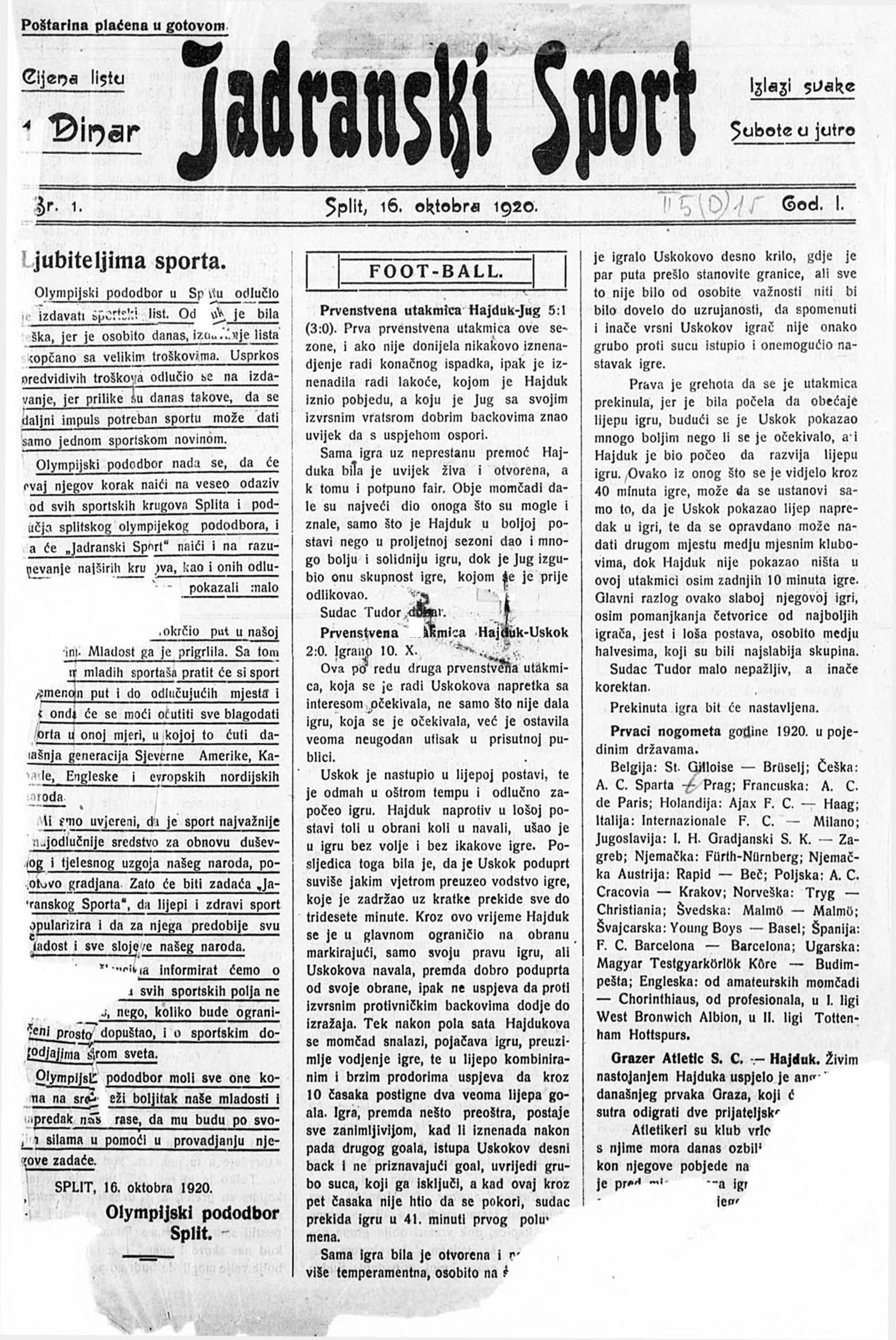 Front page of the first issue of the "Jadranski sport" weekly magazine